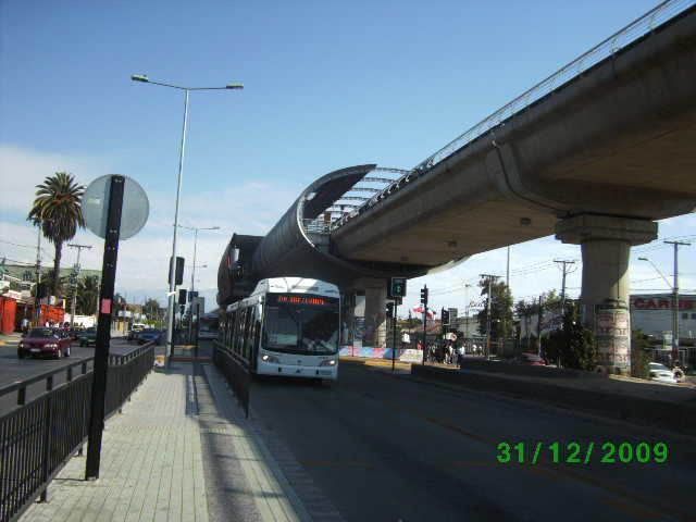 Vista panorámica de la Intersección de Vicuña Mackenna con Rojas Magallanes en el paradero 18 de La Florida, Santiago de Chile